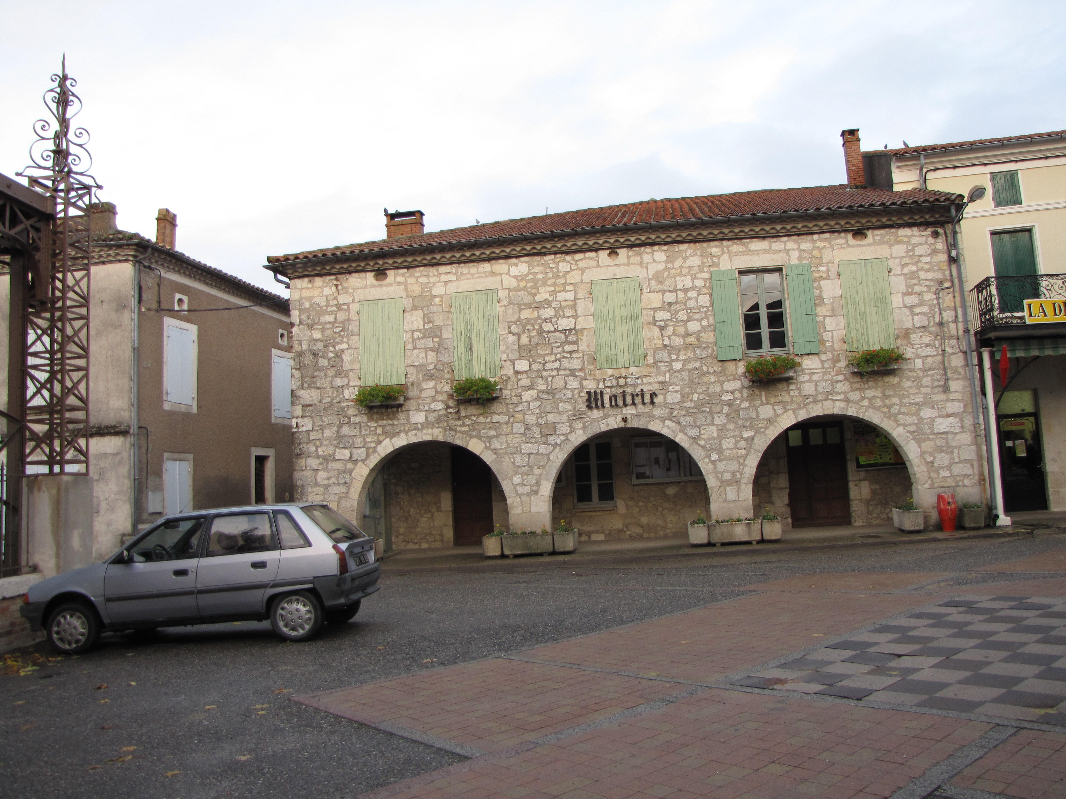 Bourg-de-Visa la mairie